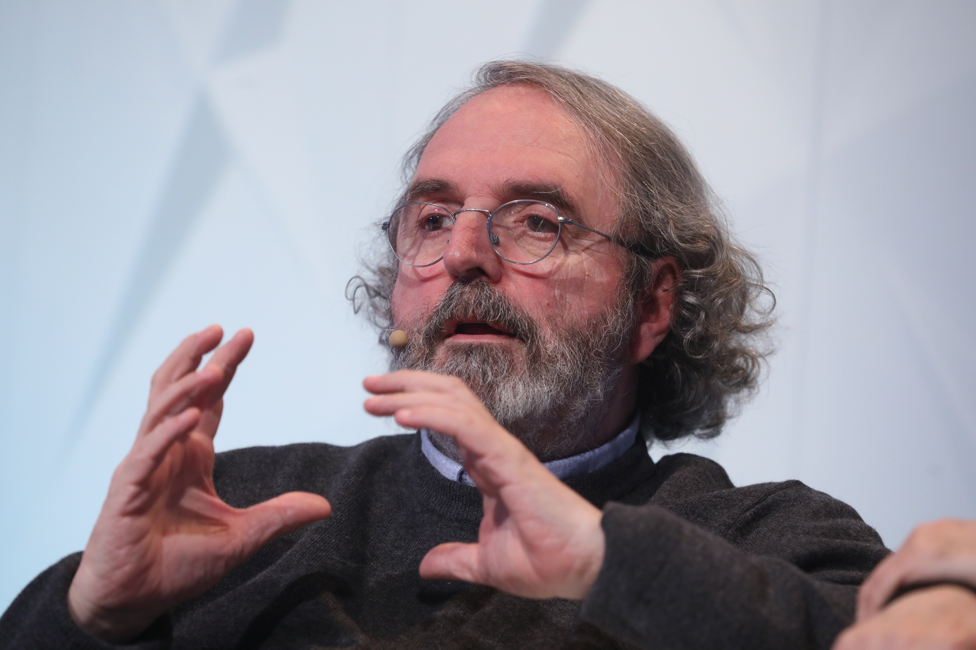 Ciclo de conferencias. "ESPAÑA SIN FILTROS". Holocausto: memoria y eterna vigilancia.